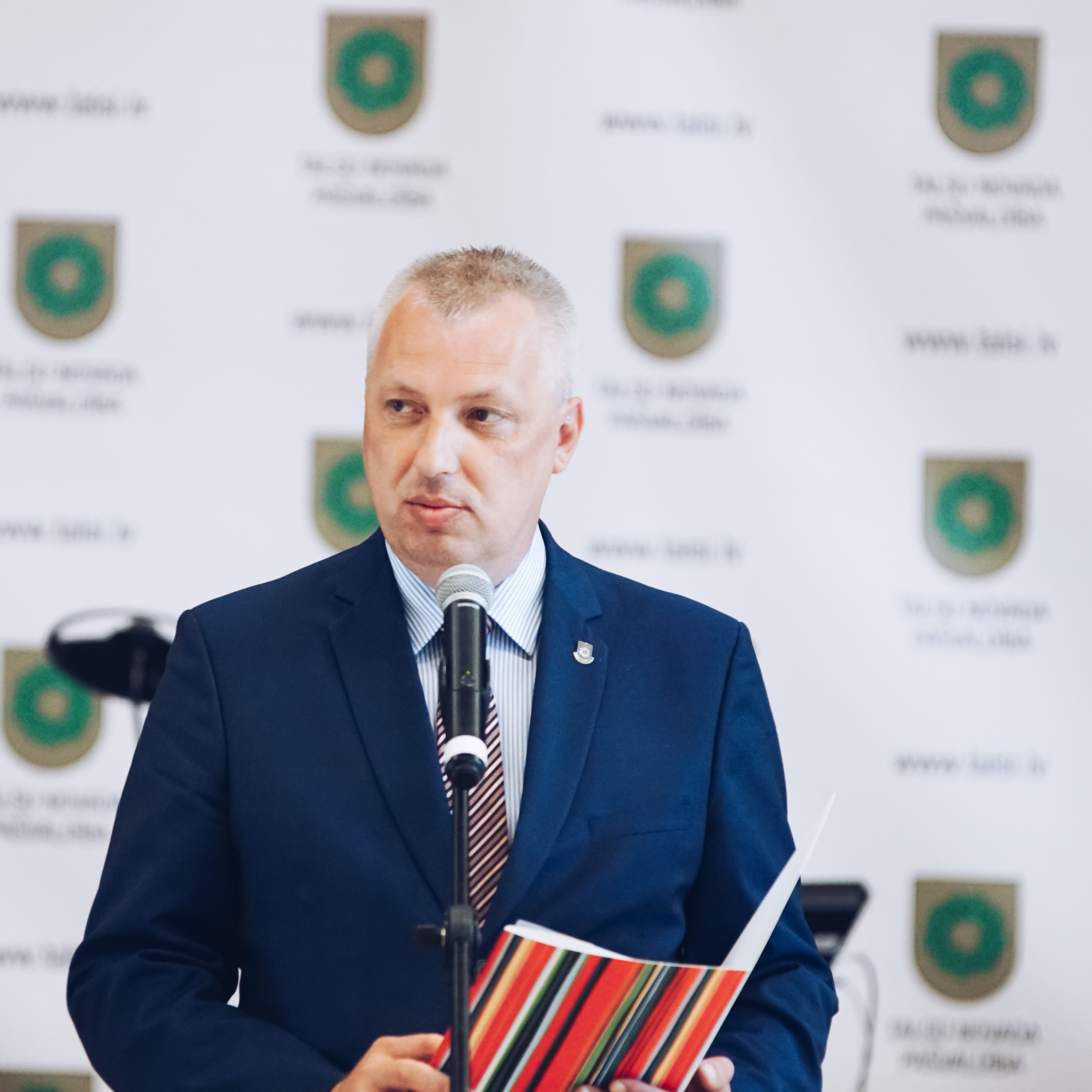 Talsu novada domes priekšsēdētājs Dainis Karols, uzrunas laikā Talsu pilsētas svētkos, vēršoties pie sadraudzības pašvaldību delegāciju pārstāvjiem, pasākumā Talsu novada domē, 2018,gada 29.junijā